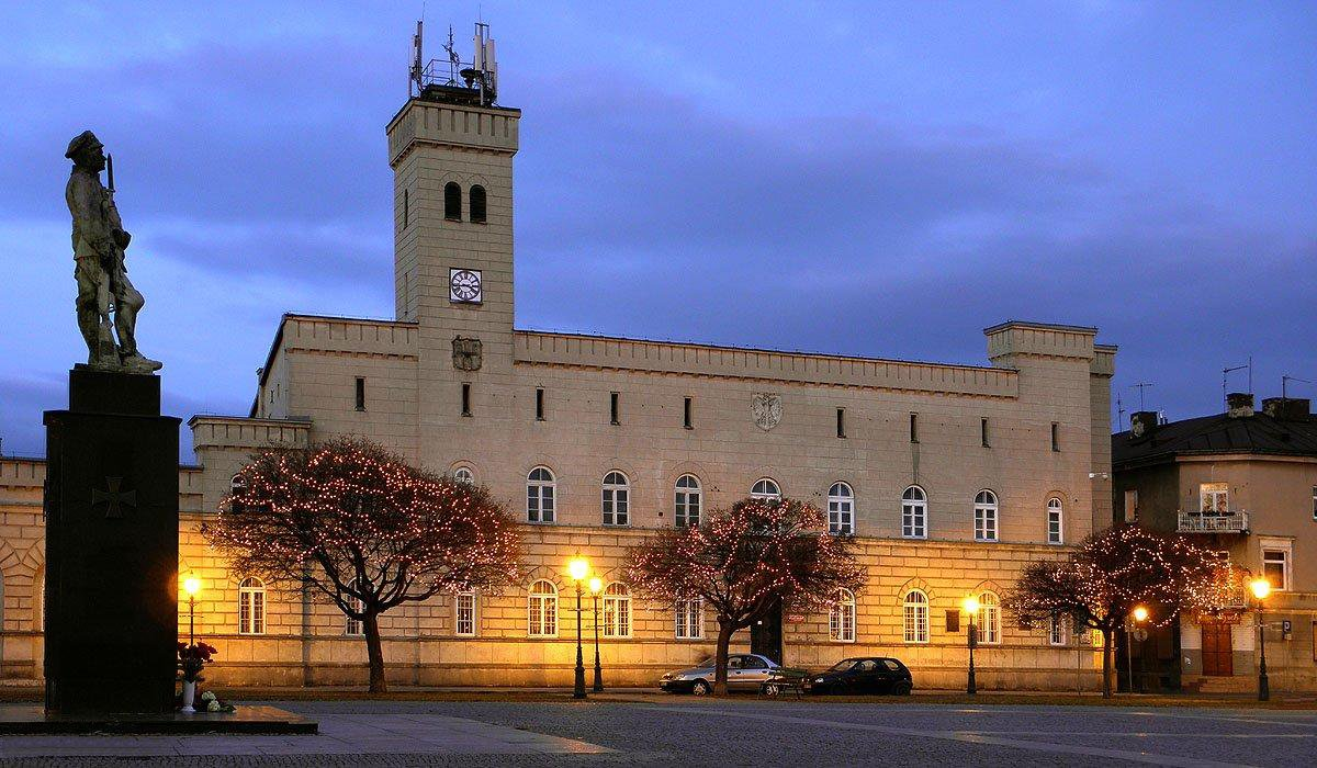 Ratusz o zmierzchu.